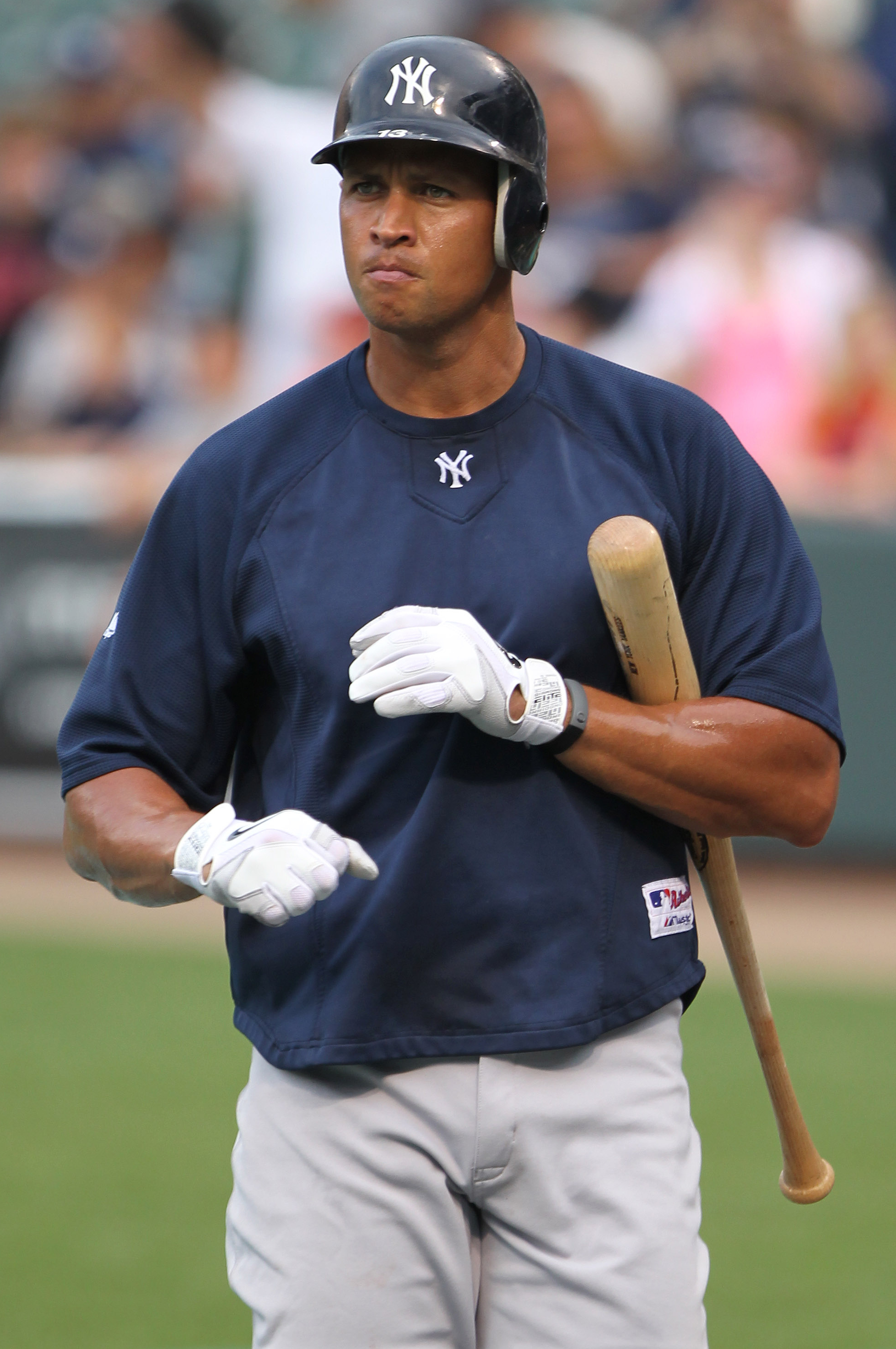 Alex Rodríguez en agosto de 2011